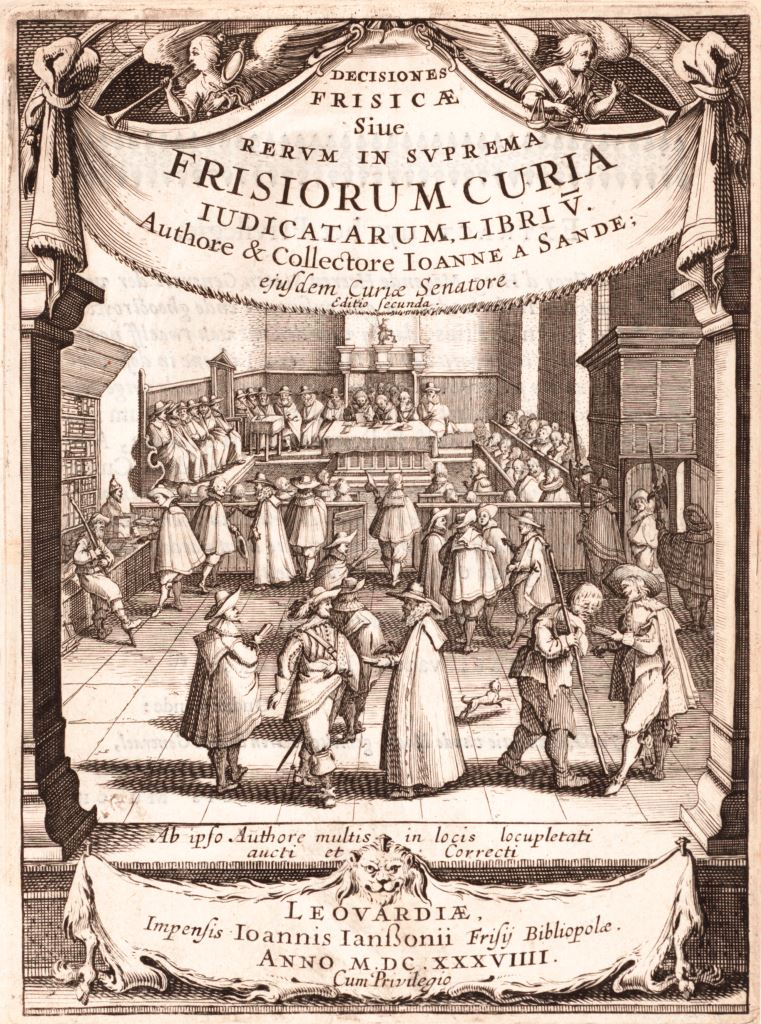 Interieur van een rechtbank, Titelprent "Decisiones Frisicæ siue Rervm in svprema Frisiorum curia iudicatarum, libri V"; uitgegeven 1639; A13535 1/31/09, 4:56 PM, 8C, 5840x6418 (144+656), 100%, Custom, 1/240 s, R37.1, G9.7, B1.9